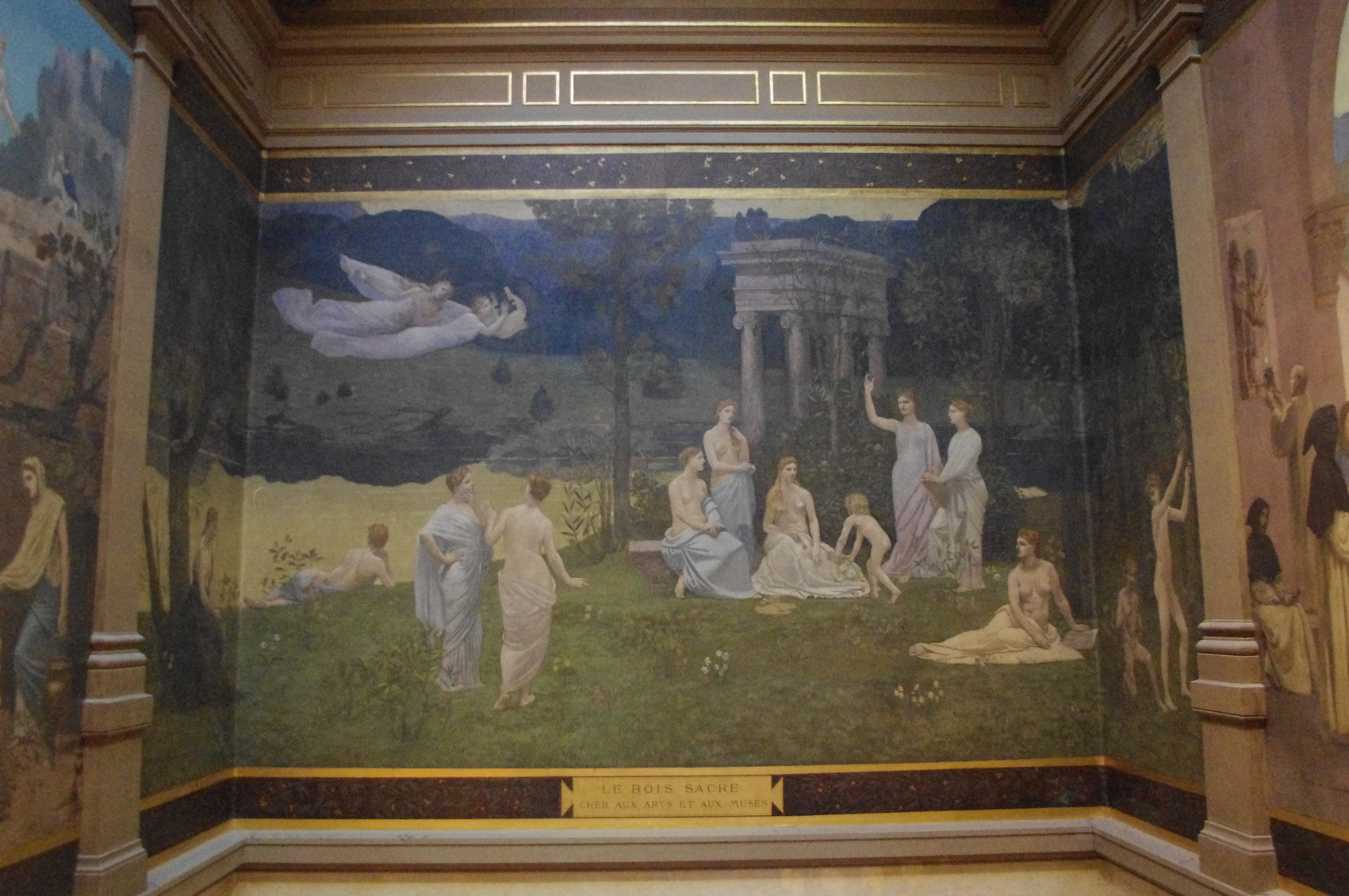 Le bois sacré cher aux Arts et aux Muses, peinture murale de Pierre Puvis de Chavannes au musée des Beaux-Arts de Lyon